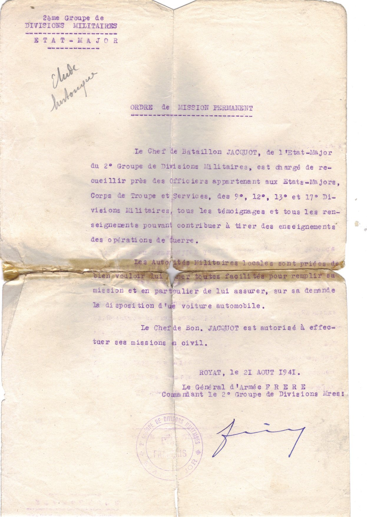 Ordre de mission permanent pour effectuer des recherches historiques (pour tirer des enseignements des opérations de guerre) signé le 21 aout 1941 par le Général d'Armée FRERE